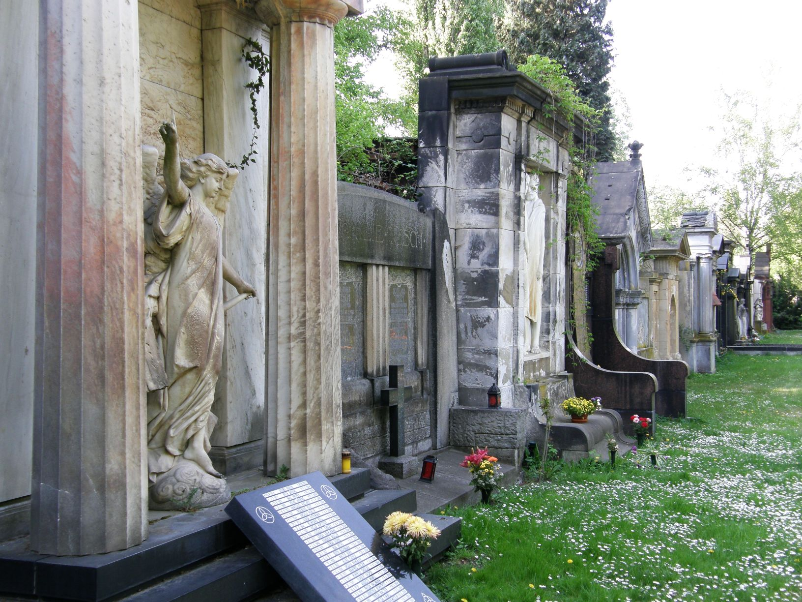 Luisenfriedhof III in Berlin; Wandgräber an der Westmauer)